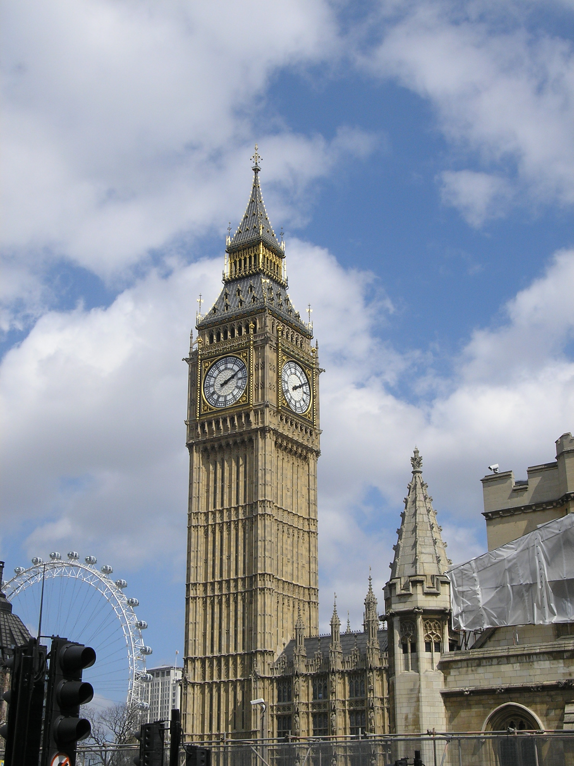 View of Big Ben